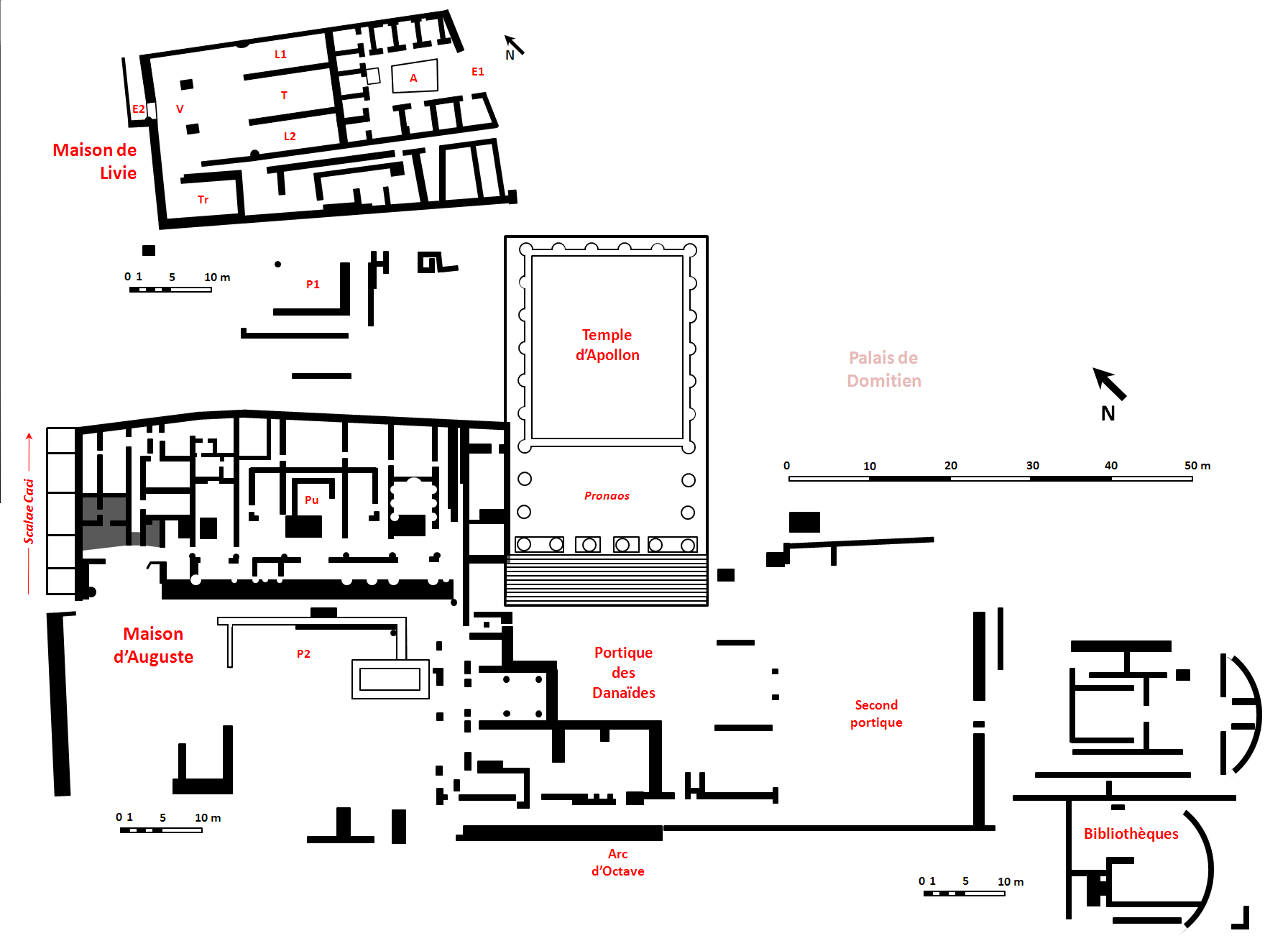 Plan de l'Area Apollinis sur le Palatin (d'après document affiché sur site).